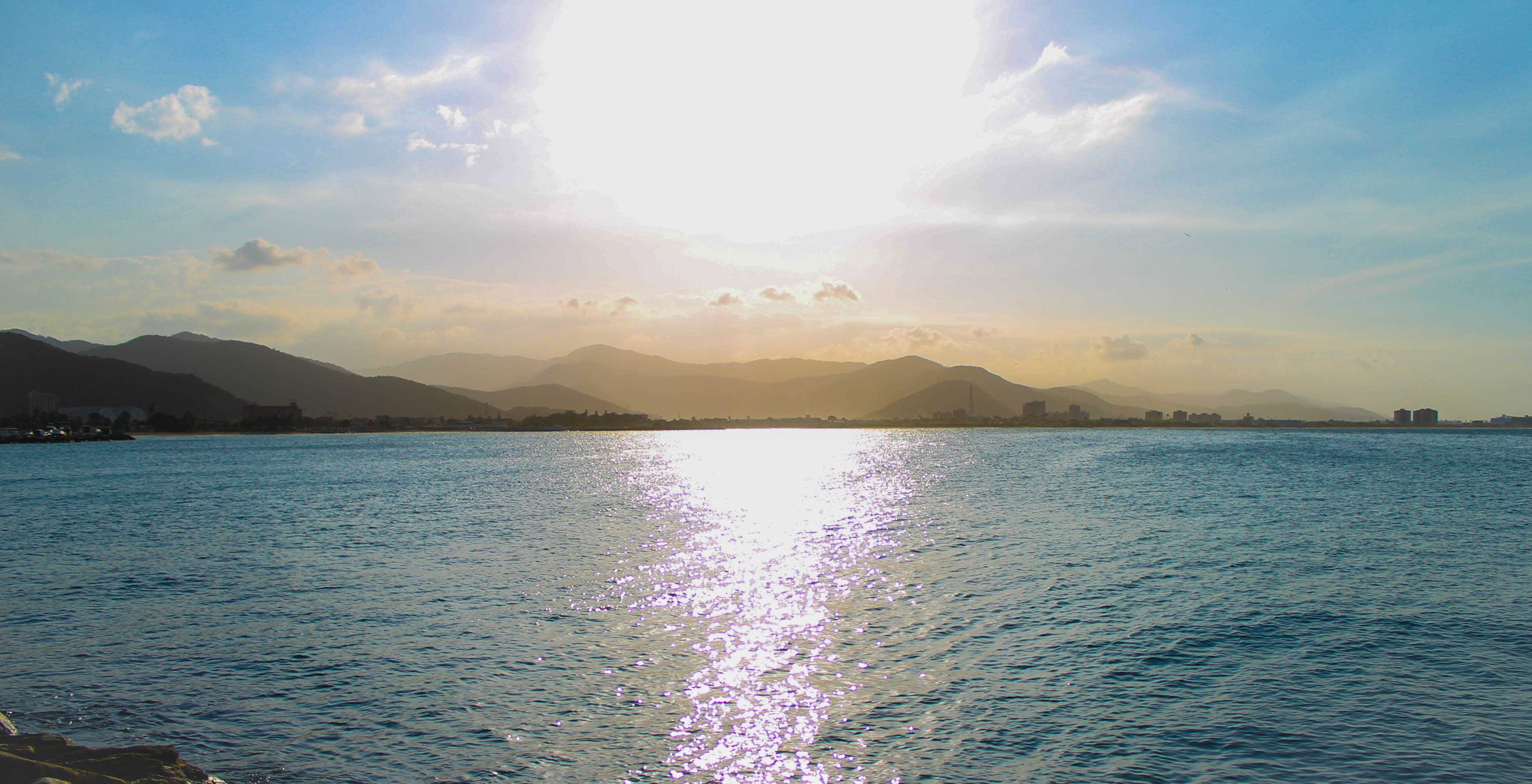 Vista al mar desde el Malecón de Puerto Cabello, estado Carabobo